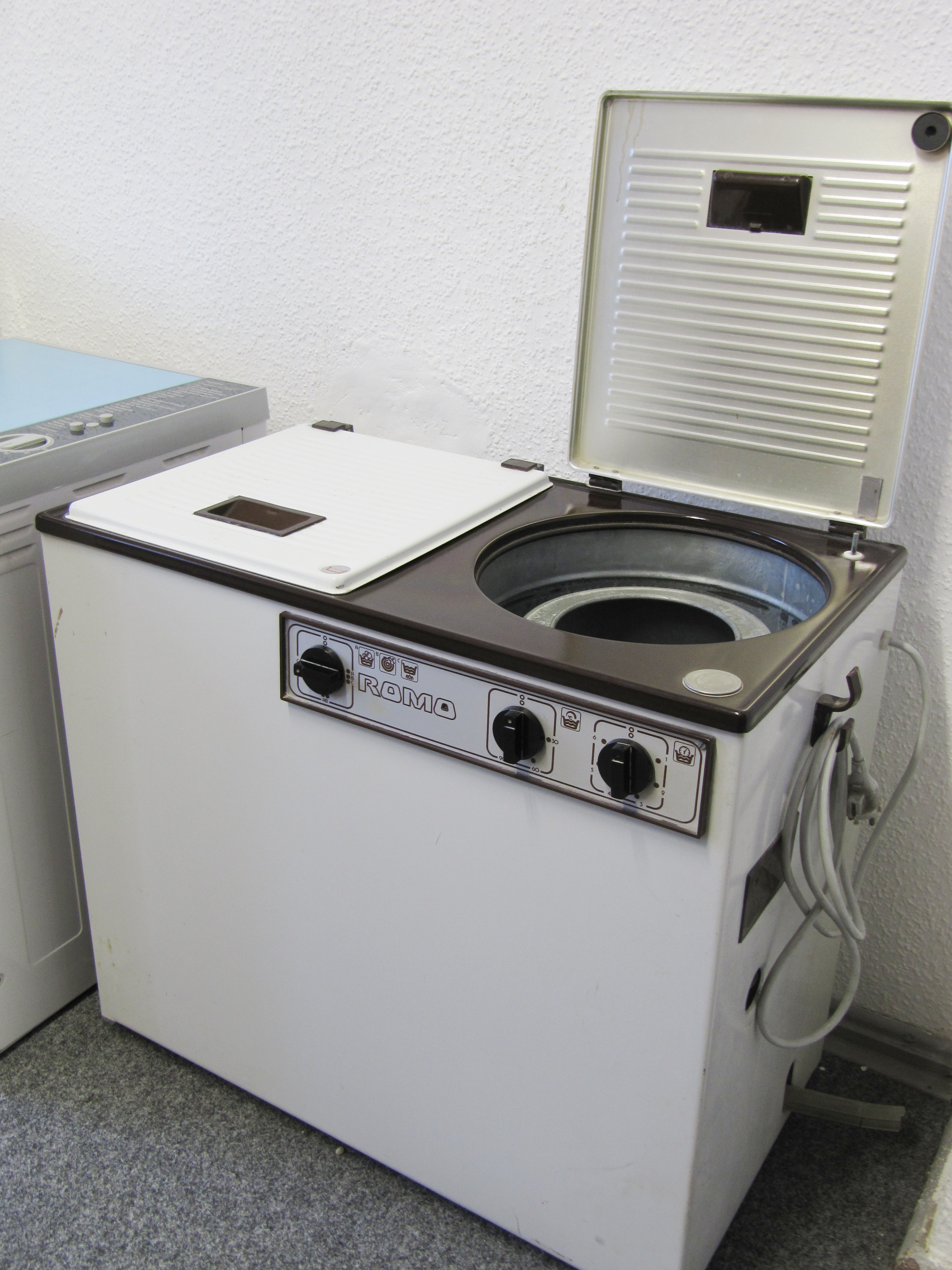 Eine Waschmaschine von Romo im DDR-Museum Pirna.